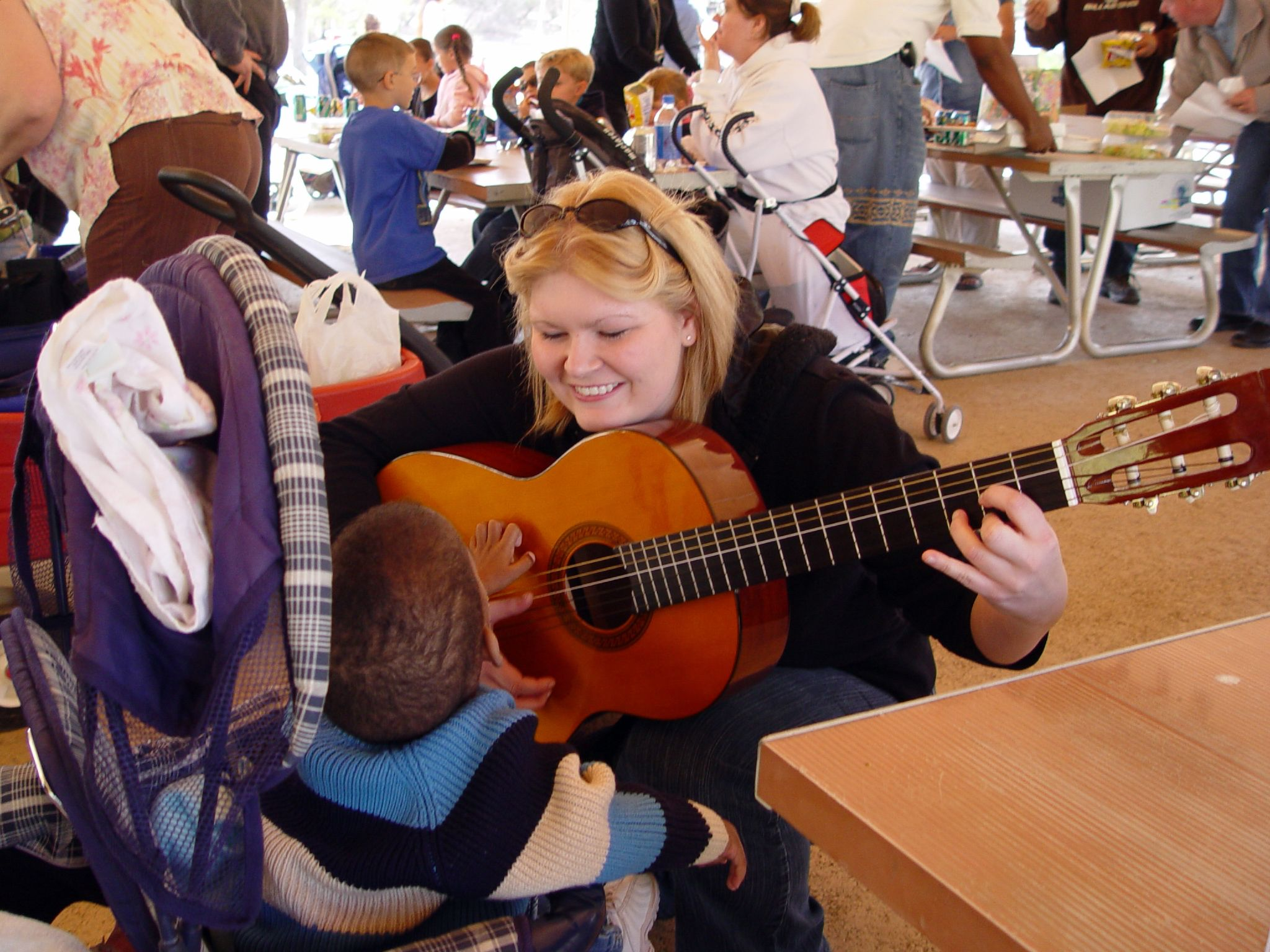 Musicoterapia Original description by photographer: Ashley entertains one of the RB children during our trip to the Phoenix Zoo